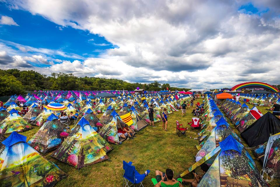 Tendas de campaña